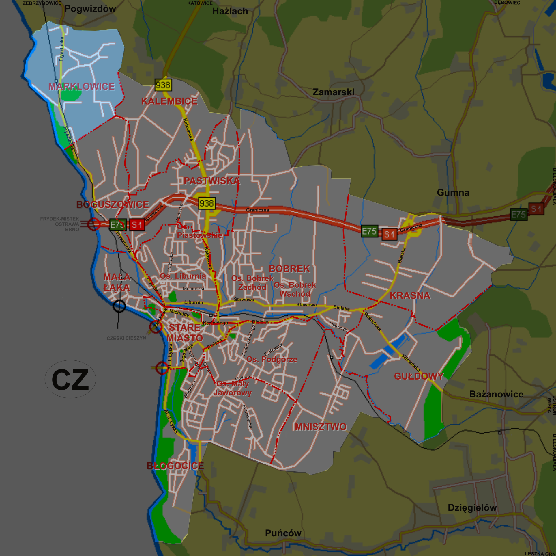 Marklowice, dzielnica Cieszyna